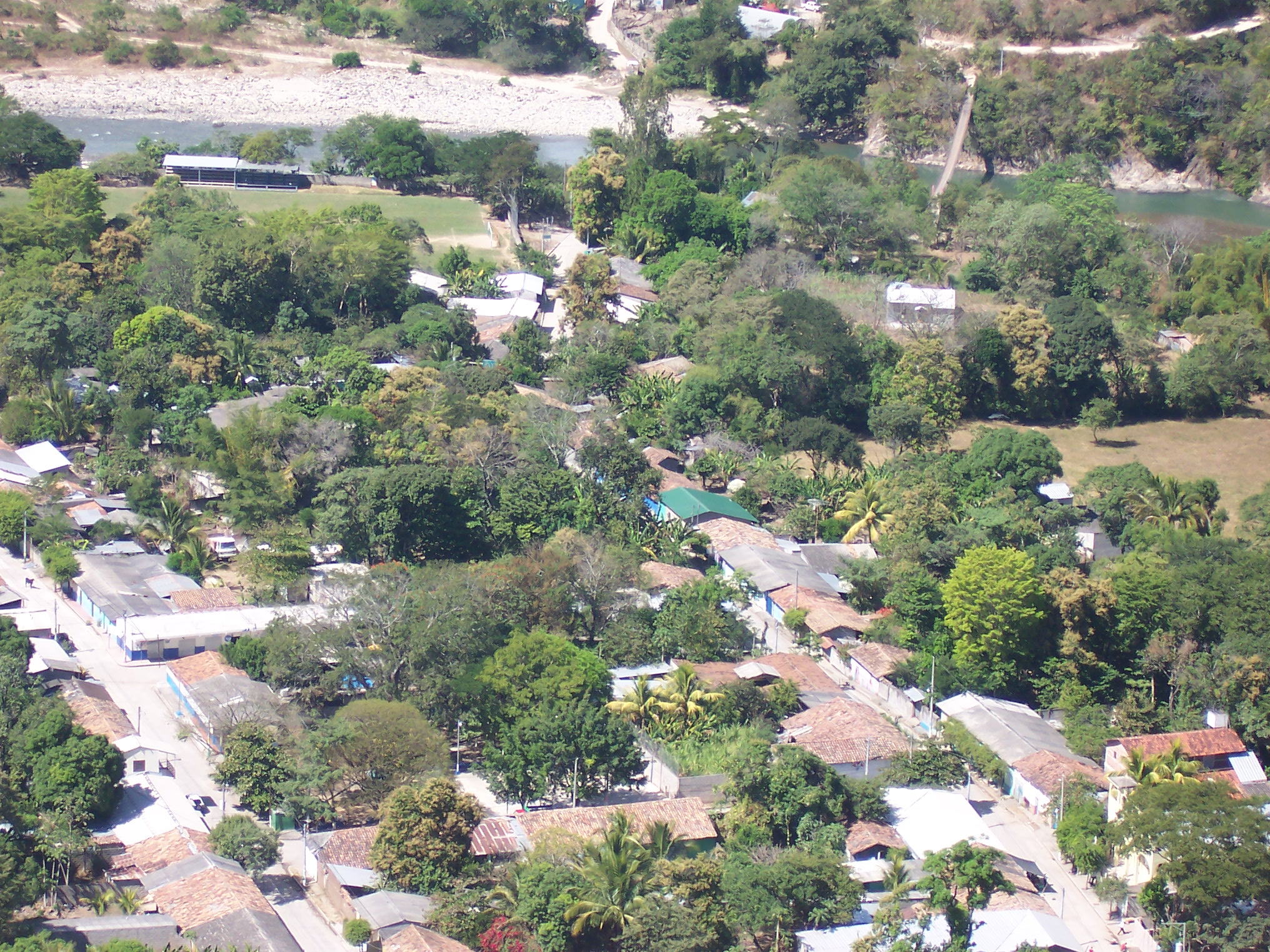 Vista aérea de Santa Rosa Guachipilin,en El Salvador